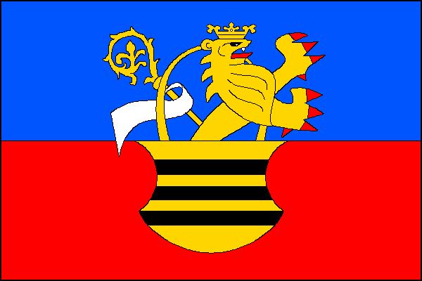 Vlajka, Janov, okres Svitavy